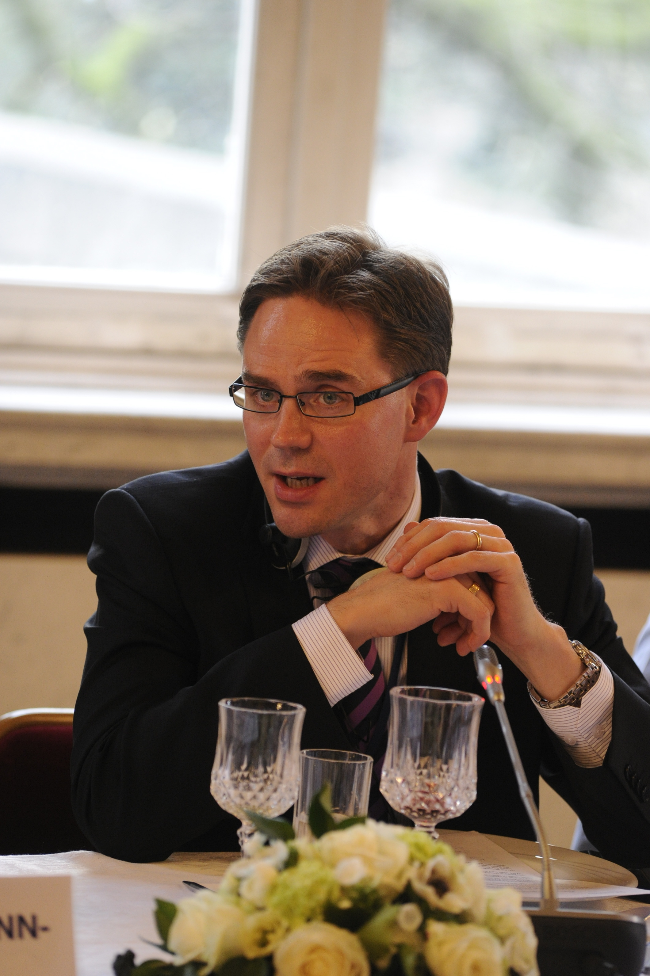 EPP Summit March 2010